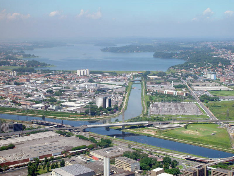 Vista aérea da barragem Guarapiranga, São Paulo, com o Rio Guarapiranga no centro confluindo com o Rio Jurubatuba, vindo da esquerda, para formar o Rio Pinheiros à direita.